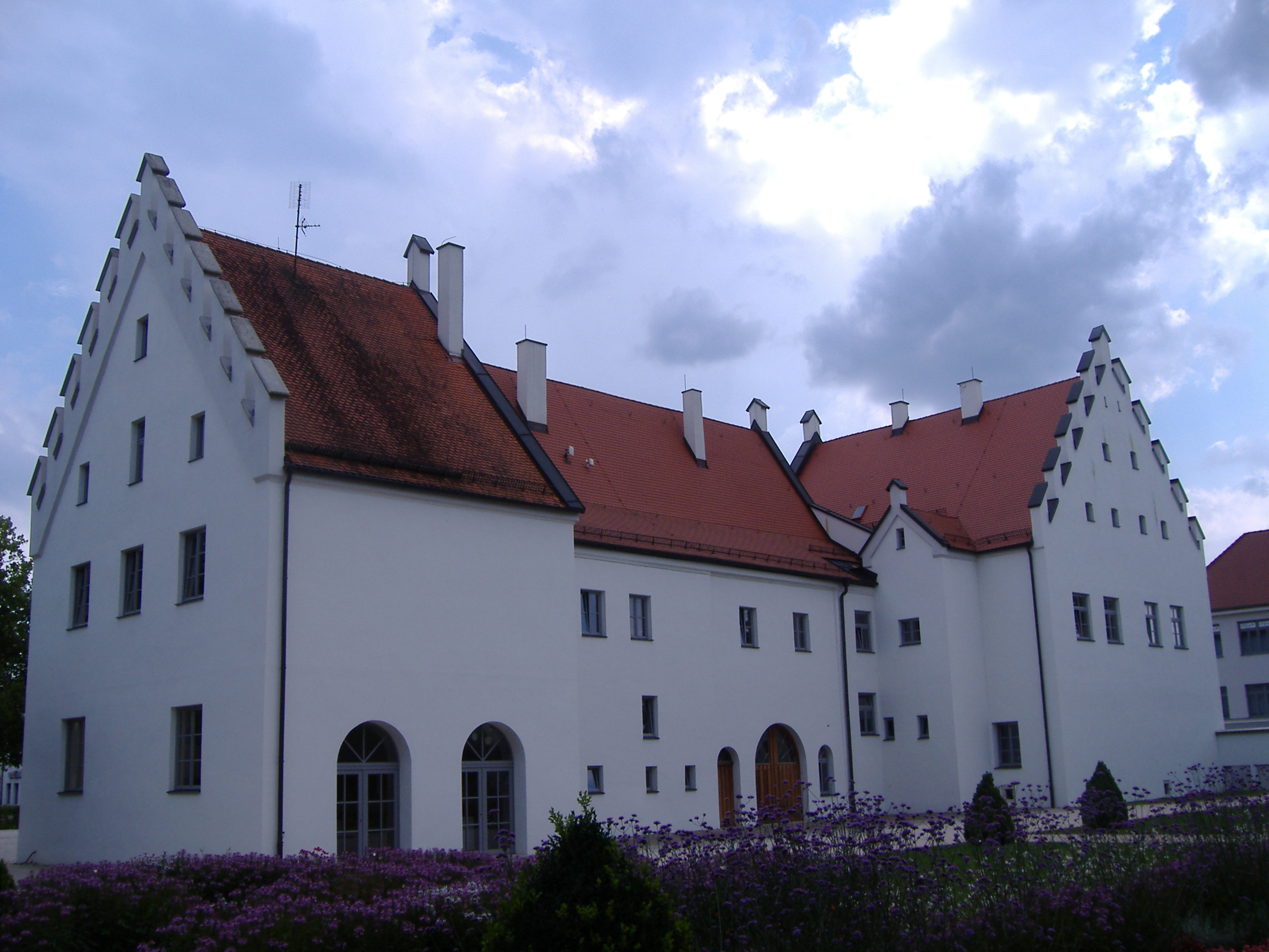 Schloss Rain am Lech